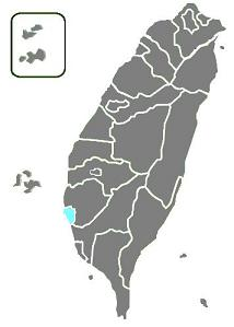 Category:台南市 原創